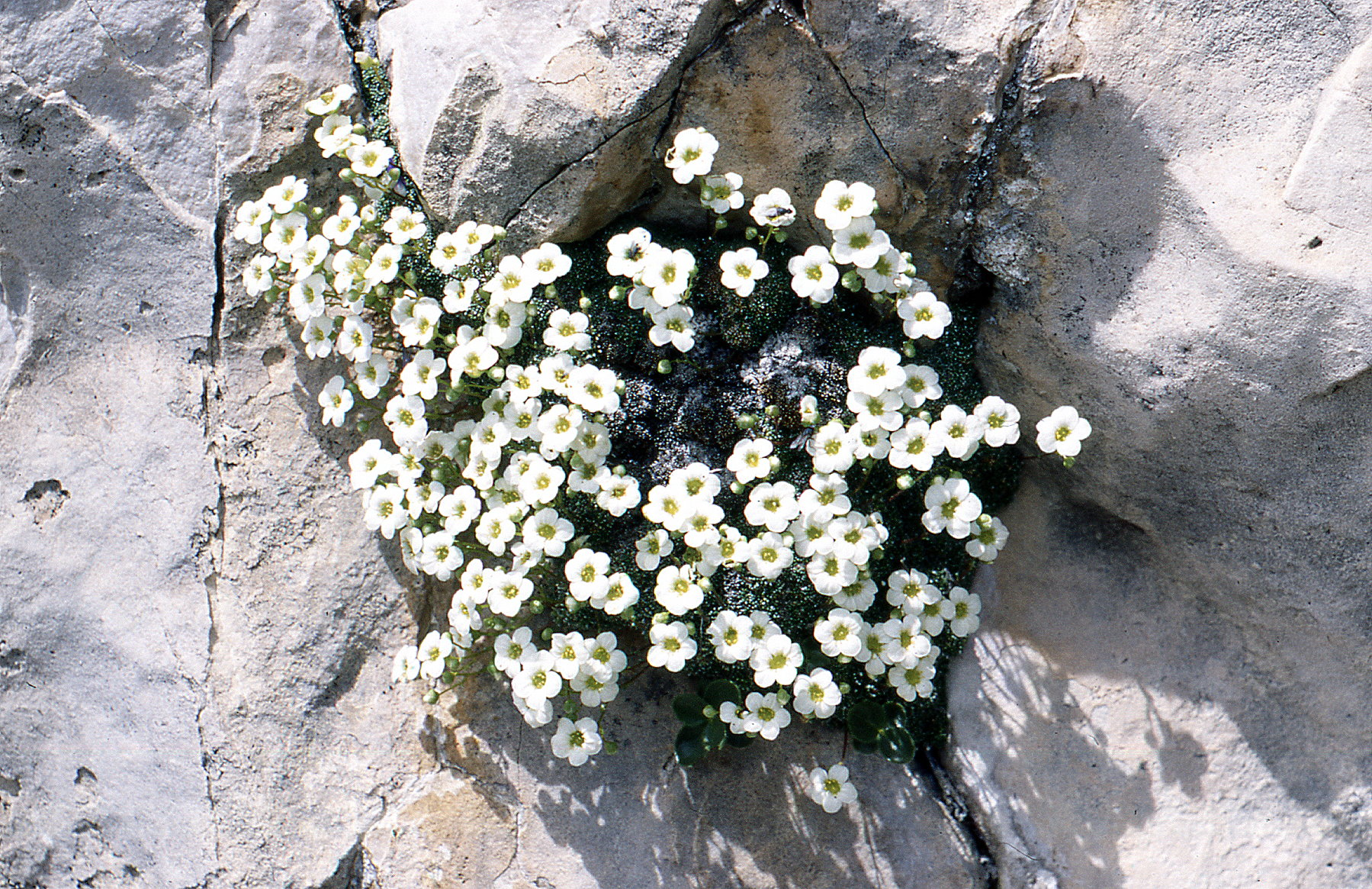 Blaugrüner Steinbrech, Saxifraga caesia, Saxifragaceae, Italien, Südtirol, Welschnofen, Rosengarten Photo: U.Schmidt, 1987